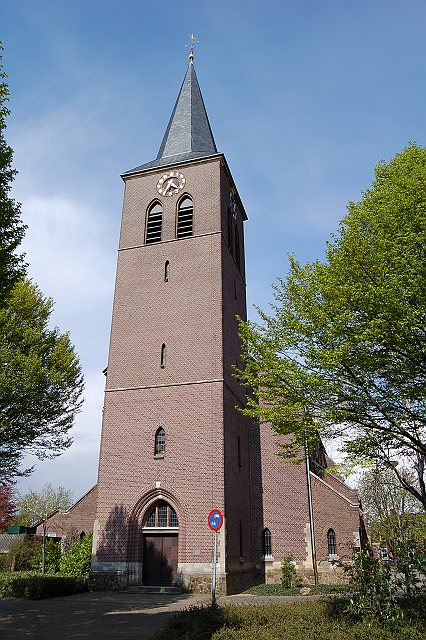 Foto is door de gebruiker zelf gemaakt.